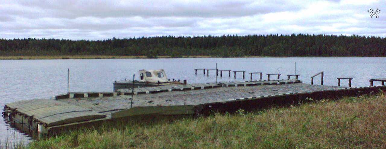 ПМП